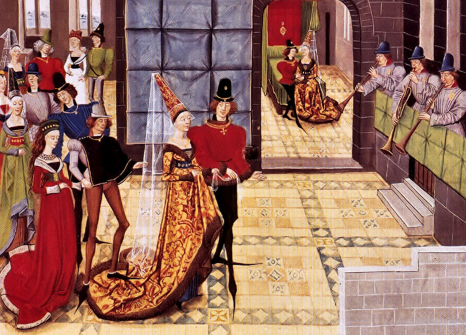 Renaud de Montauban et Clarice lors d'un banquet puis dans la chambre nuptiale, manuscrit de la Chanson de Renaud de Montauban en prose provenant de Flandre et commandé pour Philippe le Bon